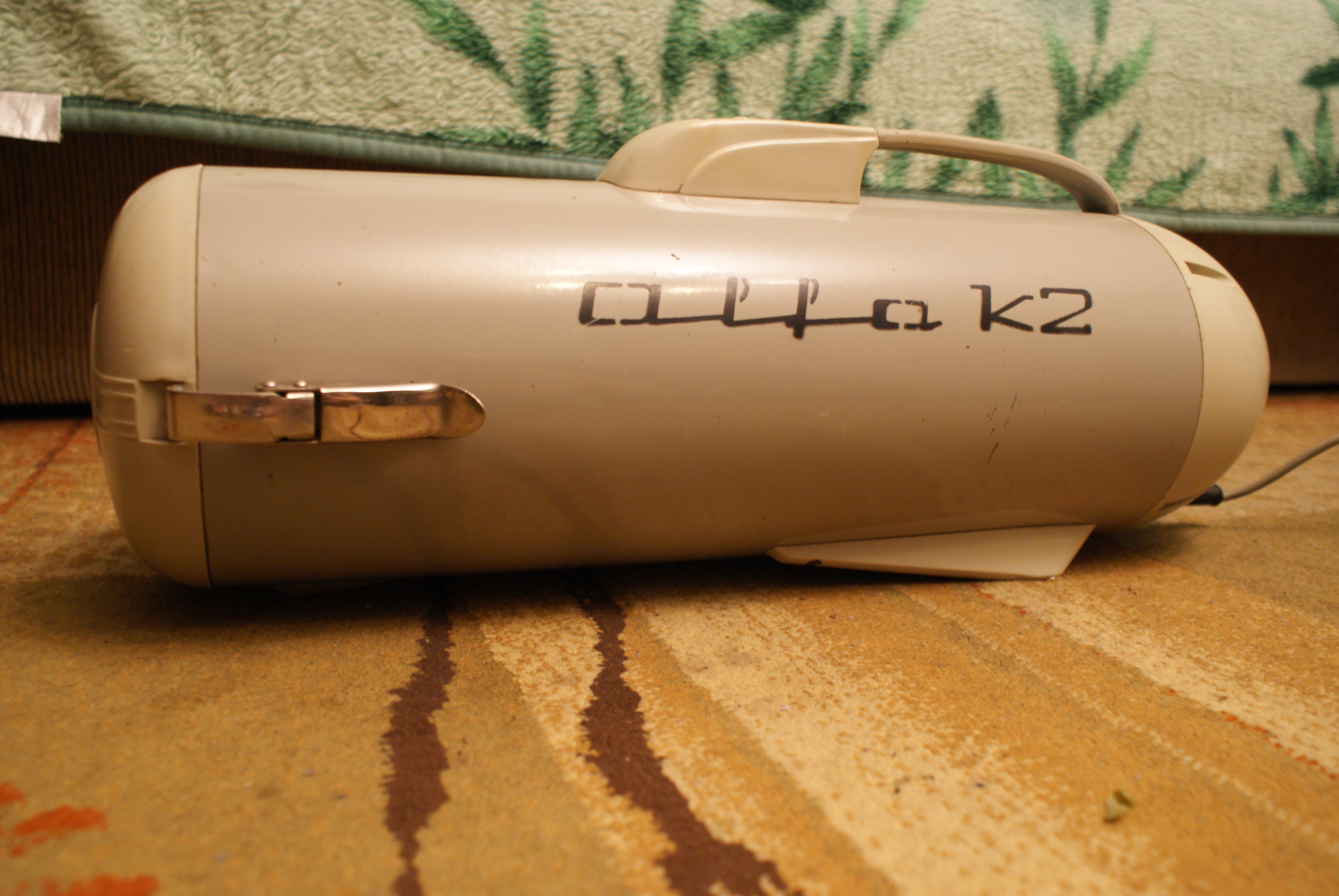 Odkurzacz Alfa K2 drugiej "generacji"